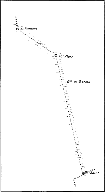 Croquis de la frontière entre l'Algérie et la Tunisie de Bir Romane à Fort Saint, réalisé telle qu'elle figure sur la Carte 1/50OOOO IGN édition 1929. Source : Procès Verbal de la réunion de la Commission Technique Algéro-Tunisienne de bornage, Annexe 1.